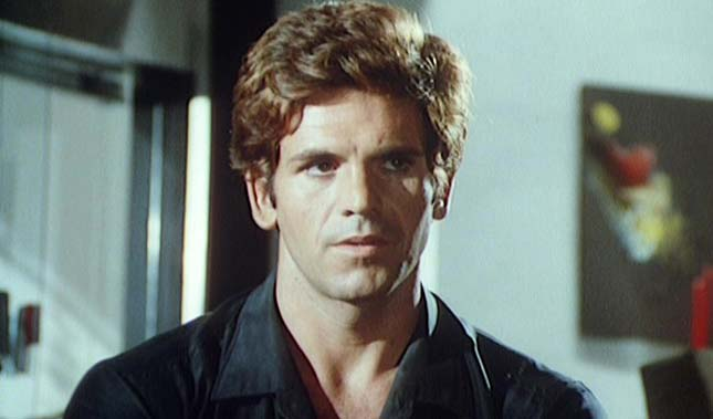 Screenshot di Howard Ross nel film 5 bambole per la luna d'agosto, regia di Mario Bava, 1970